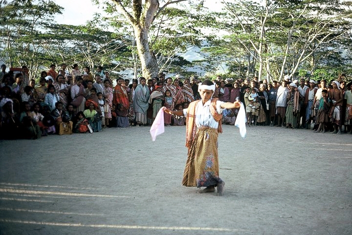 A dança do lenço é executada por um grupo de raparigas ou raparigas e rapazes que ao som da música vao executando coreografia em círculo em semi-circulo.